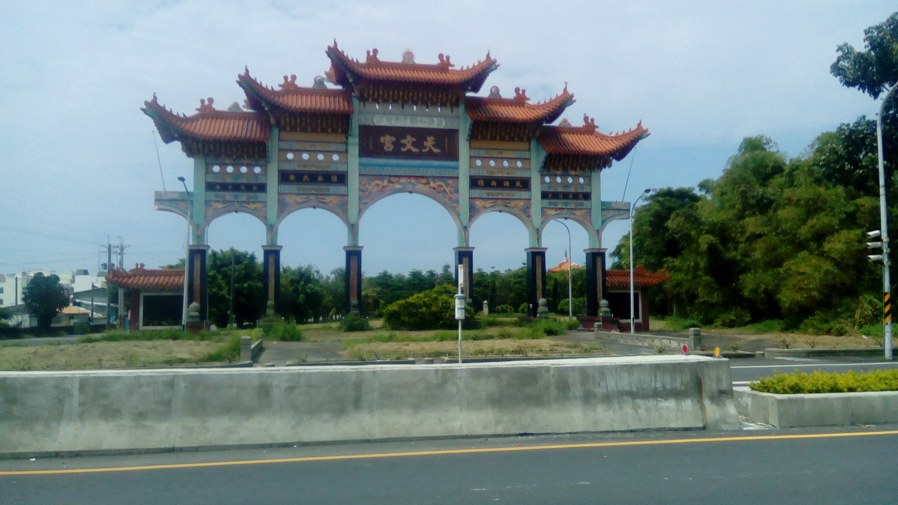 同上